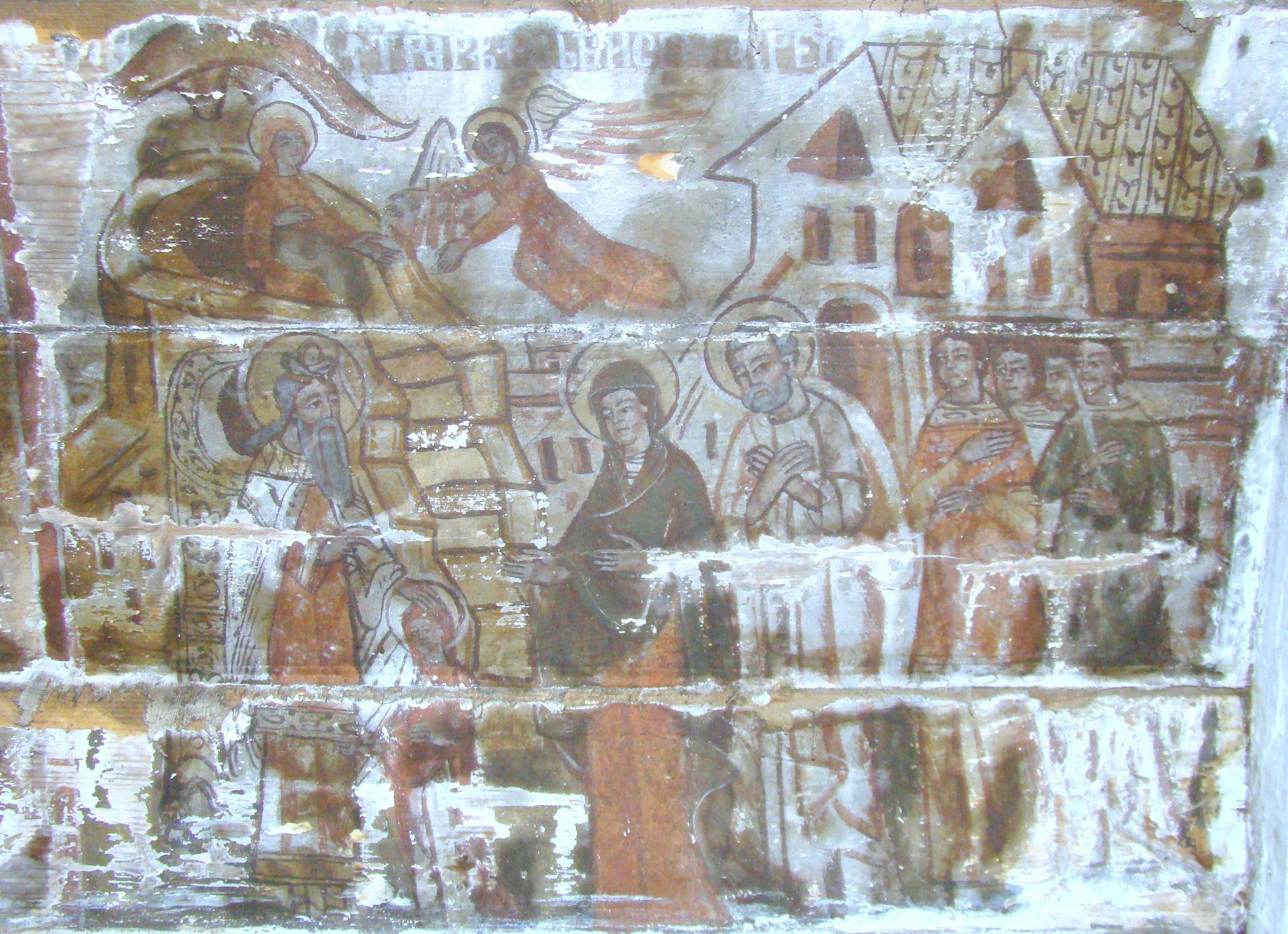 Biserica de lemn „Sfinții Arhangheli Mihail și Gavriil” din Sângătin, comuna Apoldu de Jos, județul Sibiu